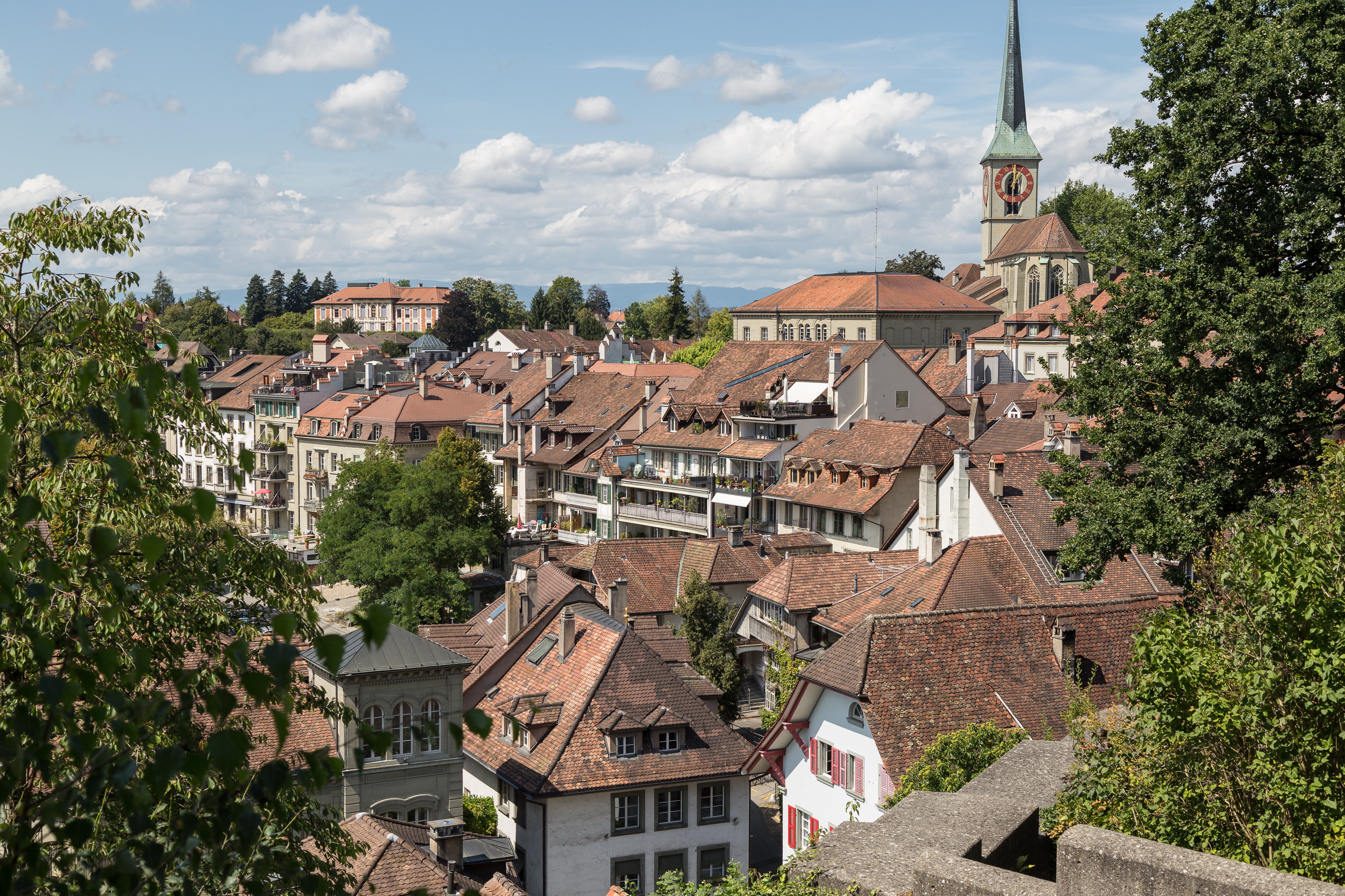 Blick vom Schloss auf einen Teil der Oberstadt von Burgdorf